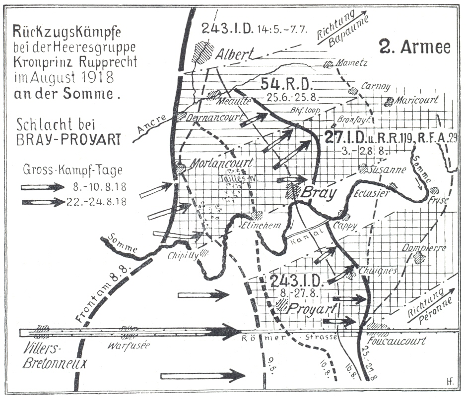 Karte: Rückzugskämpfe an der Somme bei Bray-Proyart